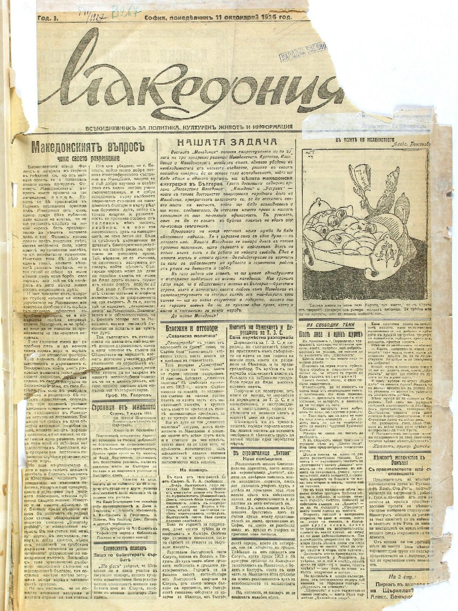 Главата на вестник Македония, брой 1.